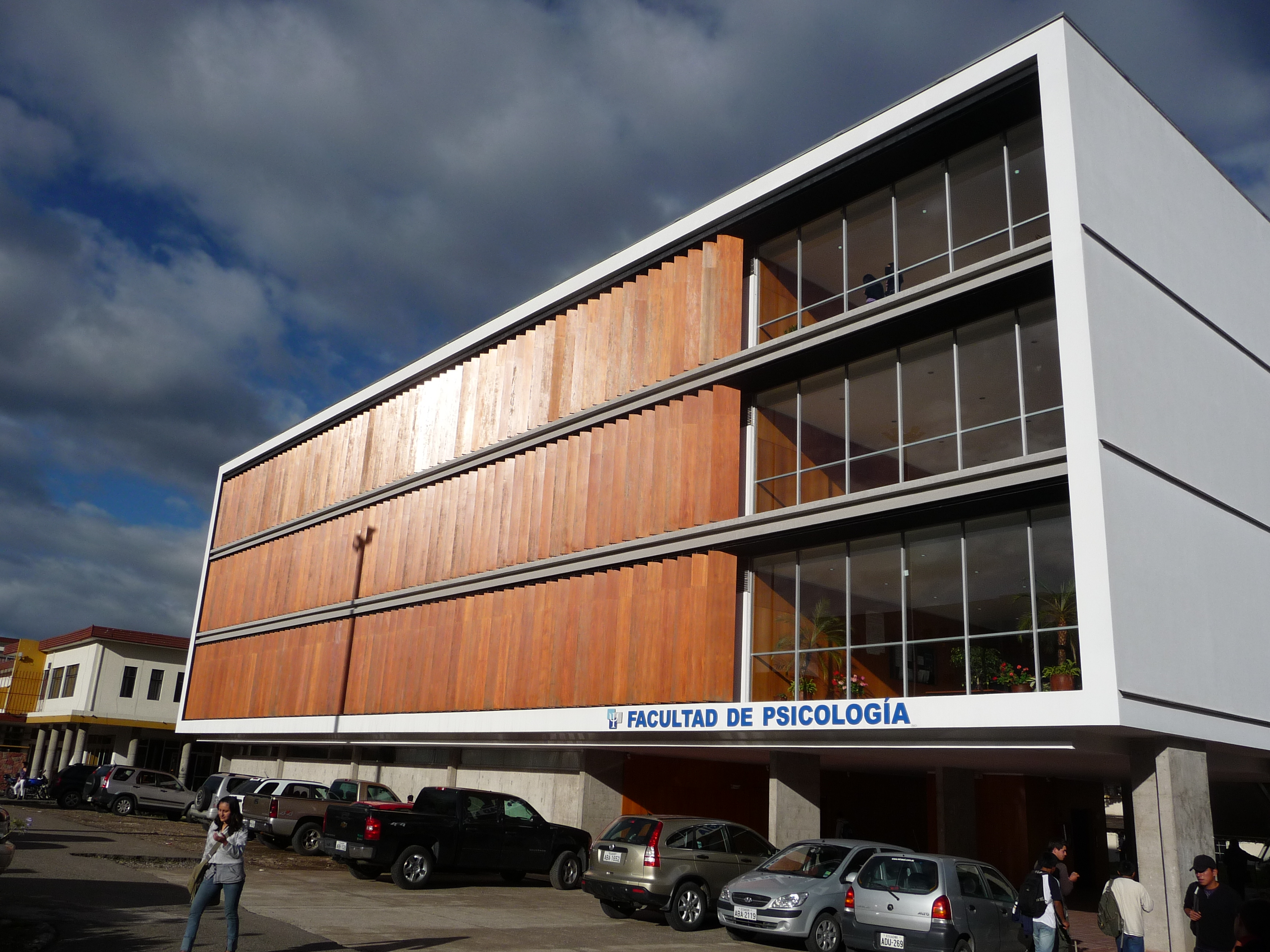 Obra de María Augusta Hermida y Javier Durán